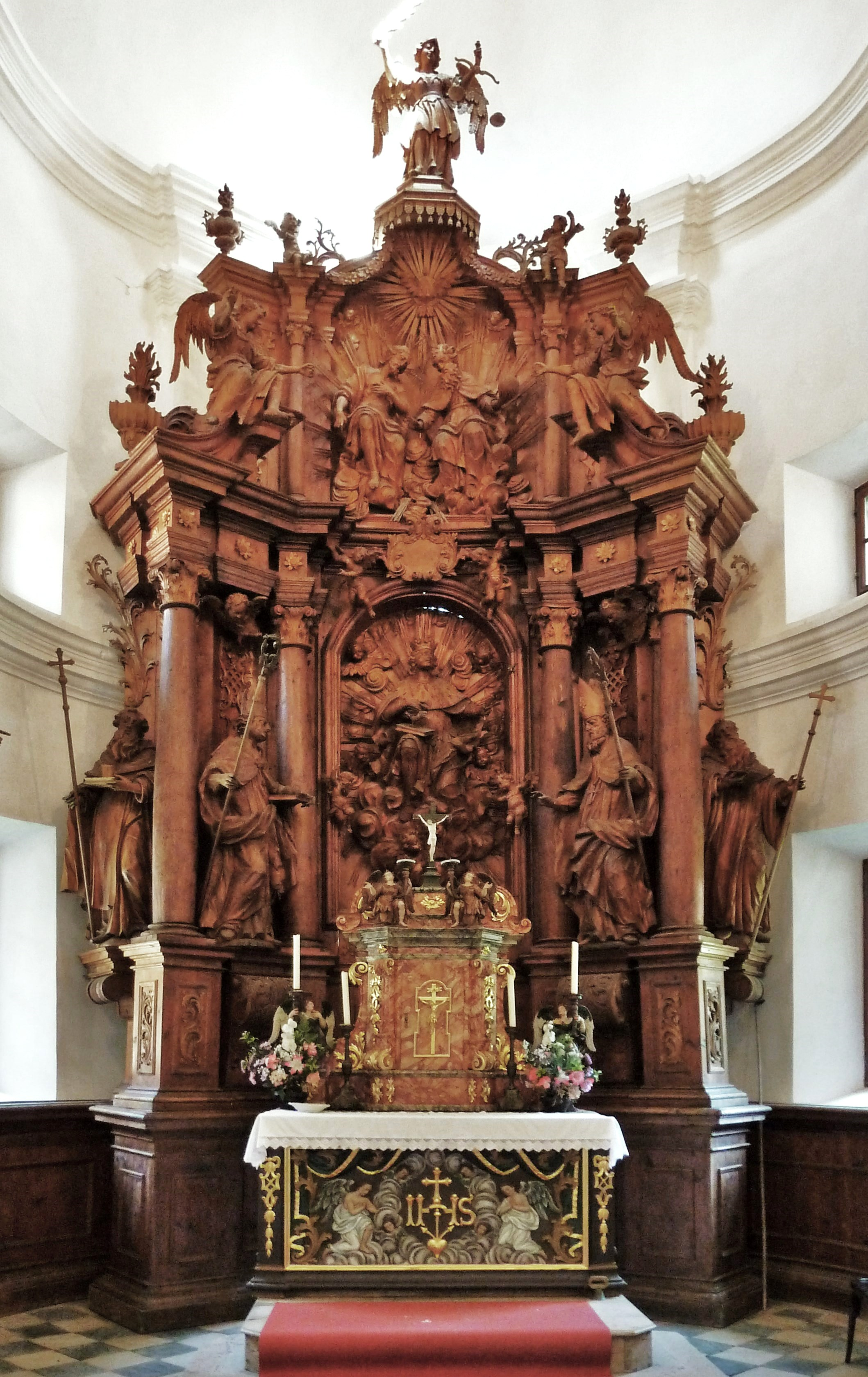 Nußberg kath. Filialkirche hl. Oswald, Hochaltar von Johann Pacher